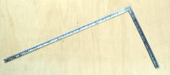 Japanese ruler